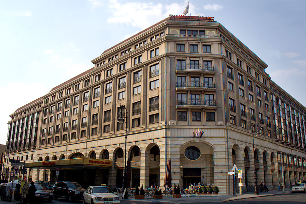 Das Westin Grand Hotel in der Friedrichstraße in Berlin. Das Hotel wurde 1987 eröffnet als Interhotel.